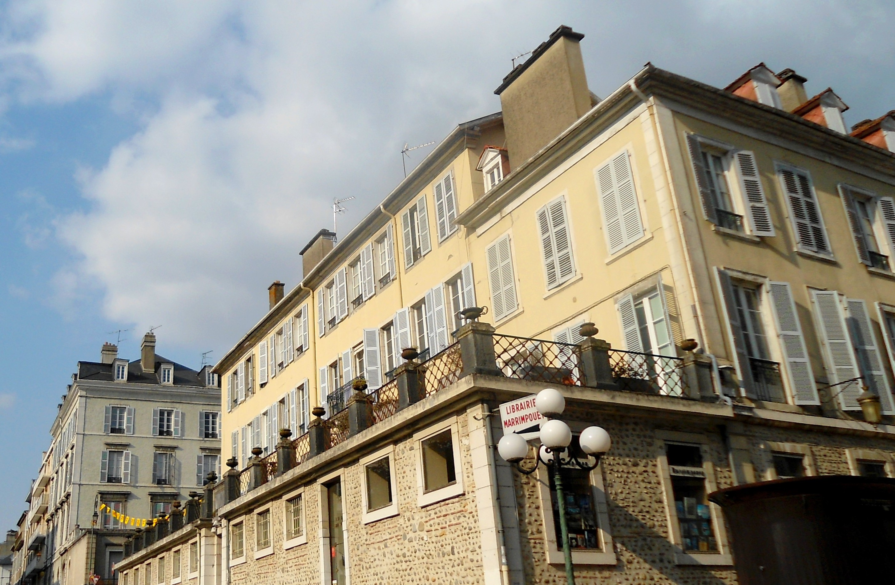 Ostau Dupó, Vinhancor, Marrimpoei, a Pau, Bearn